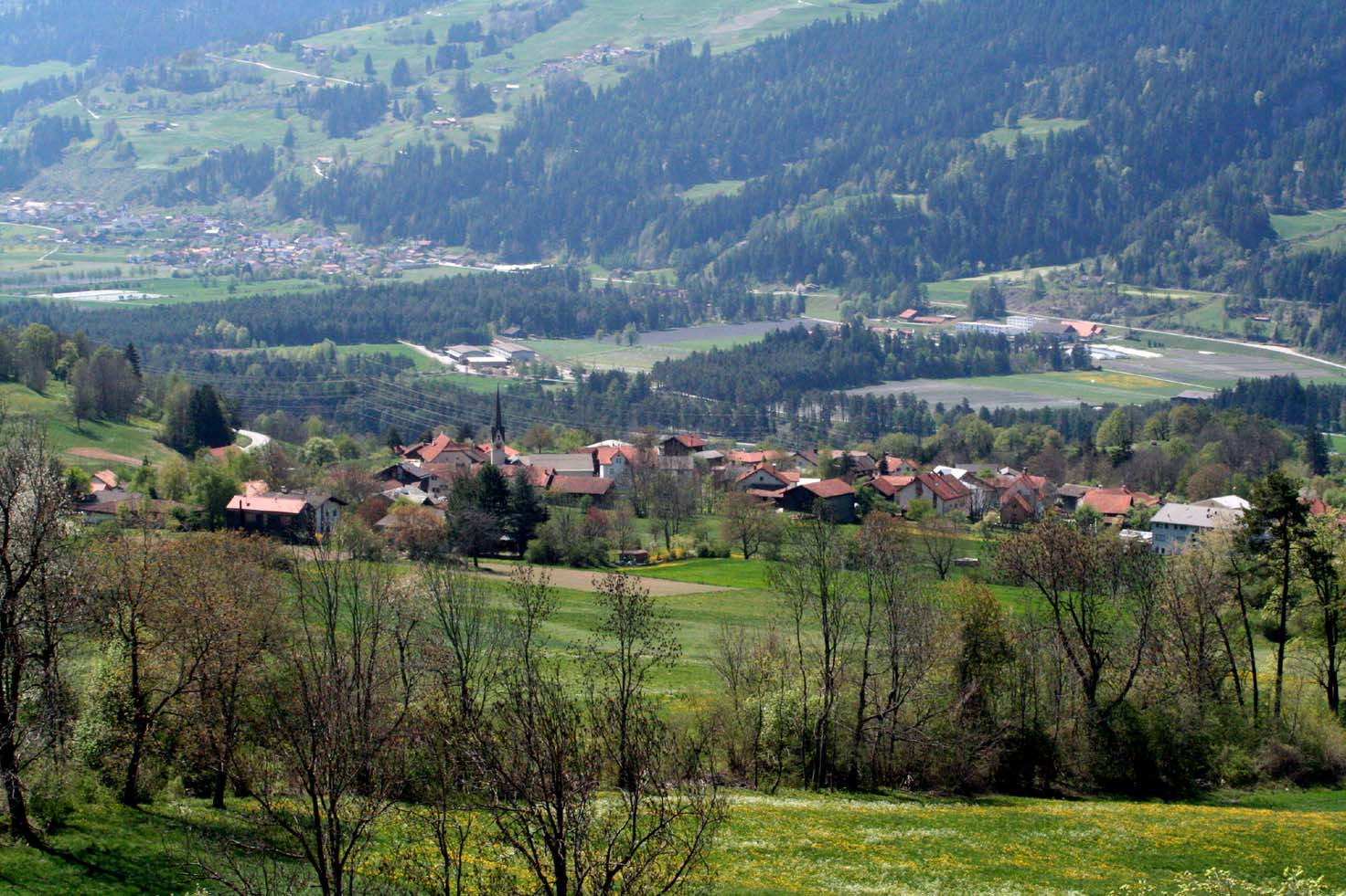 Paspels